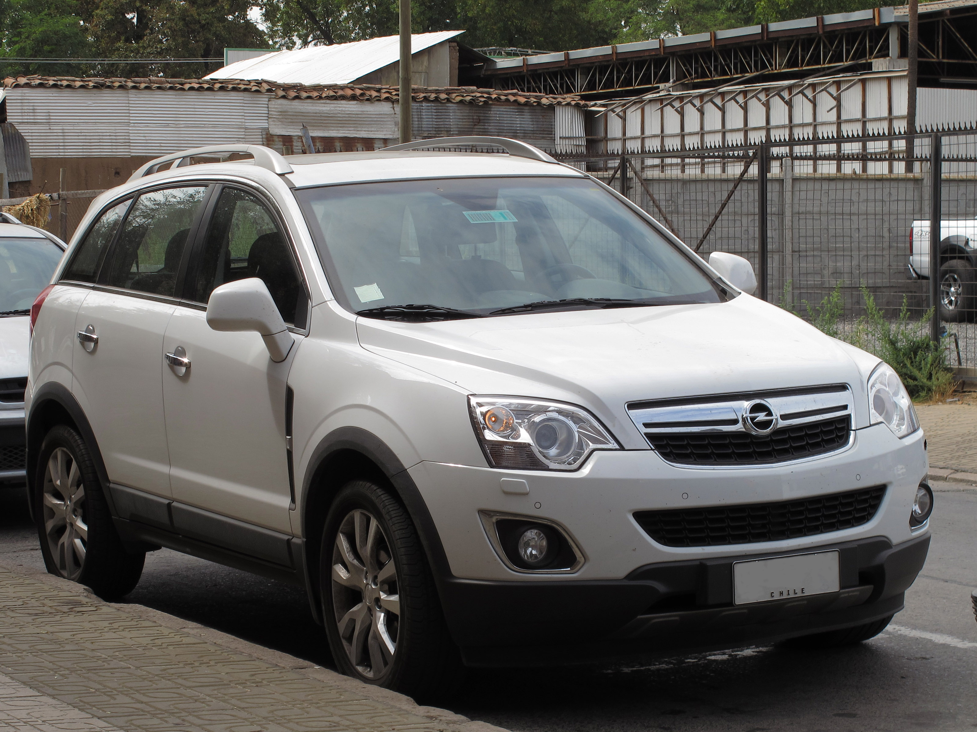 Opel Antara 2.2 CDTi Cosmo 4x4 2015